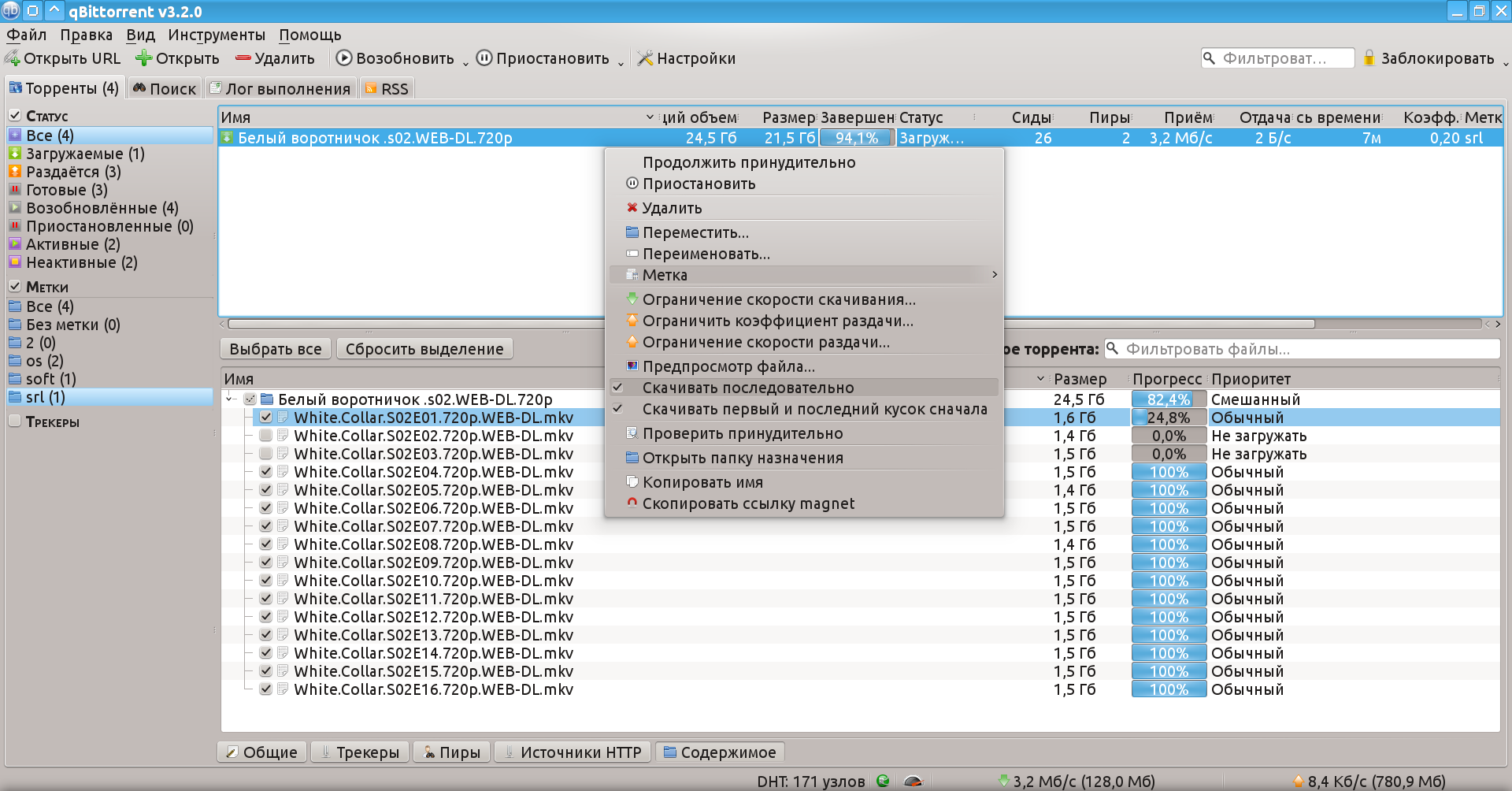 QBittorrent - Kubuntu 14.04.2 - загрузка последовательная